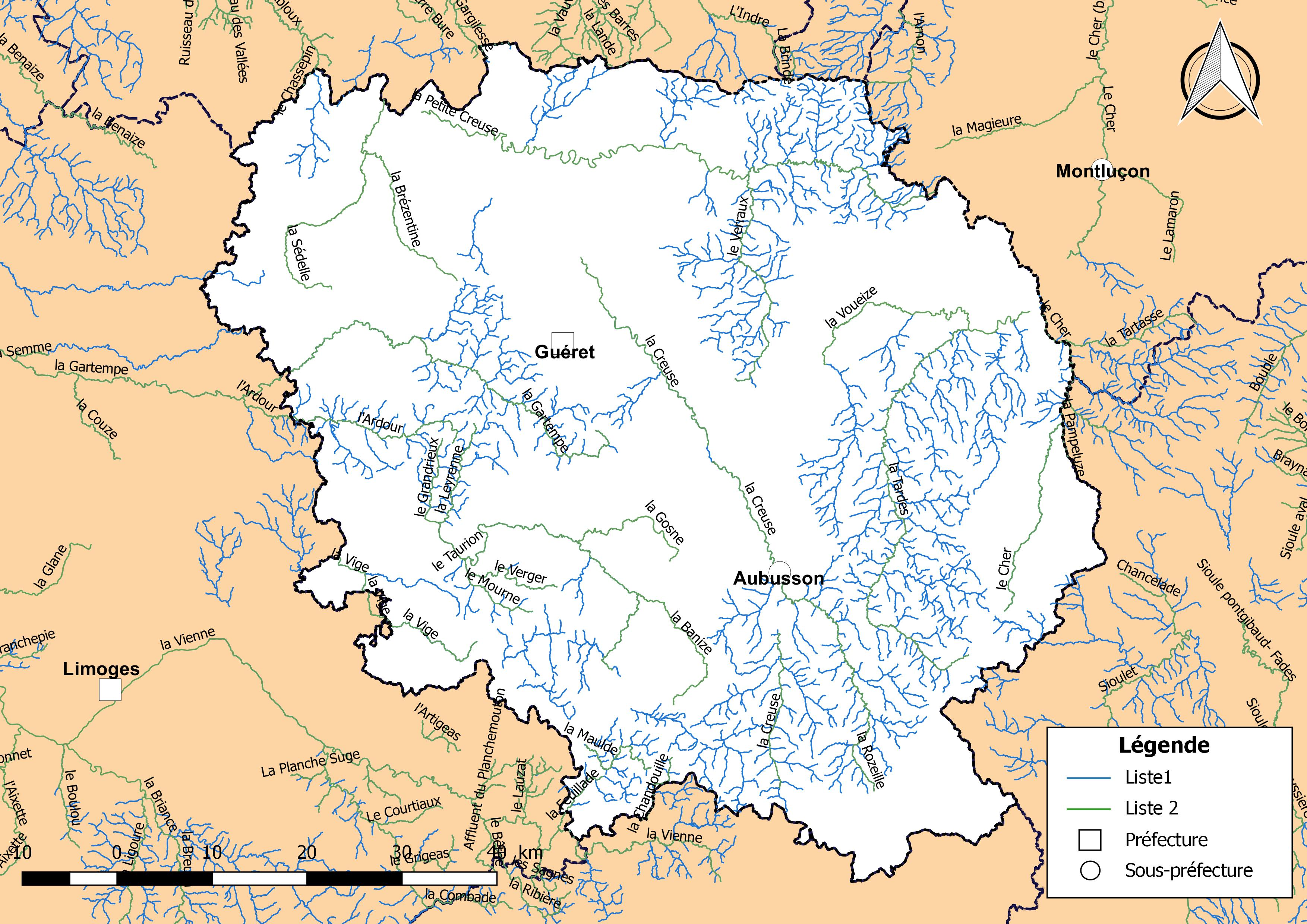 Classement des cours d'eau du département de la Creuse (France) au titre de la continuité écologique (article L214.17 I du Code de l'environnement).